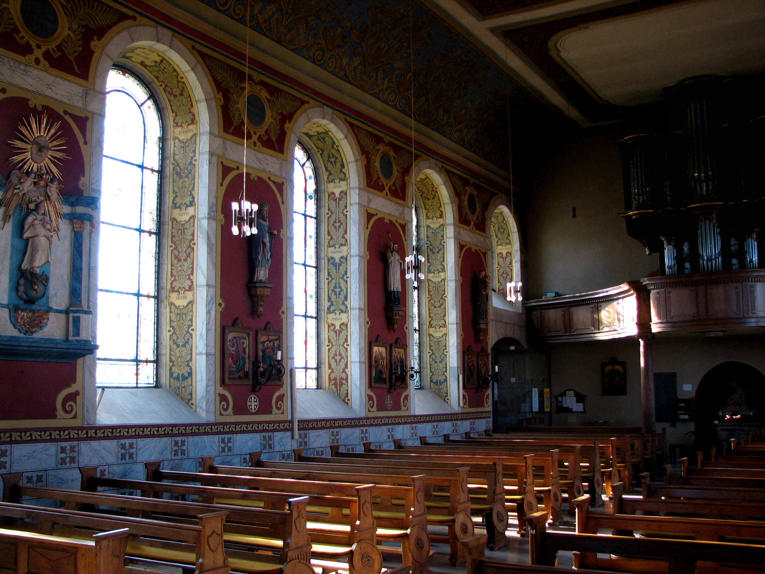 Innenraum mit Orgel der Kirche St. Maria Magdalena in Effeln